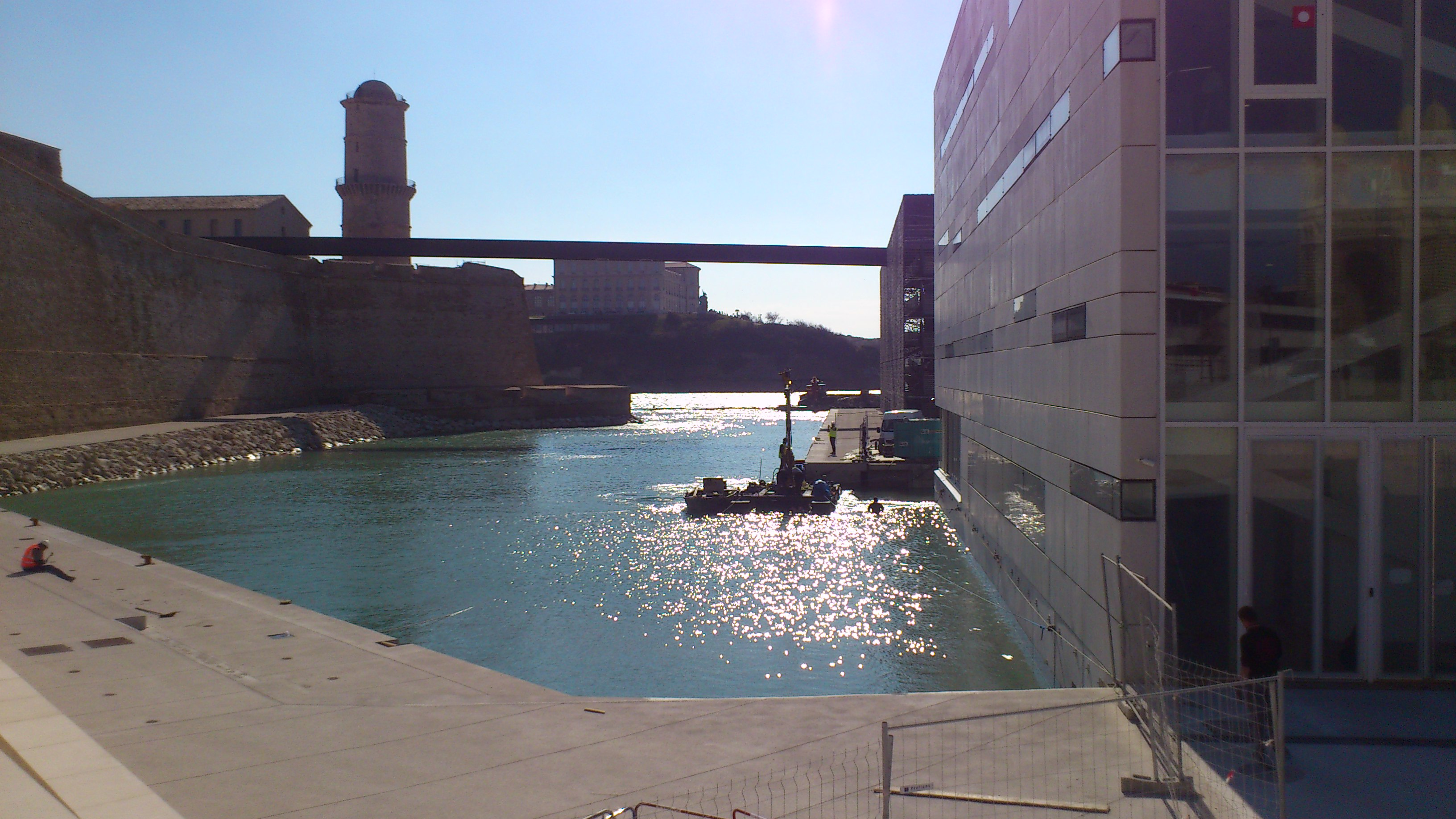 Bassin entre le fort Saint Jean et le MUCEM et la villa méditerranée, toujours en travaux, Mars 2013, avec la passerelle